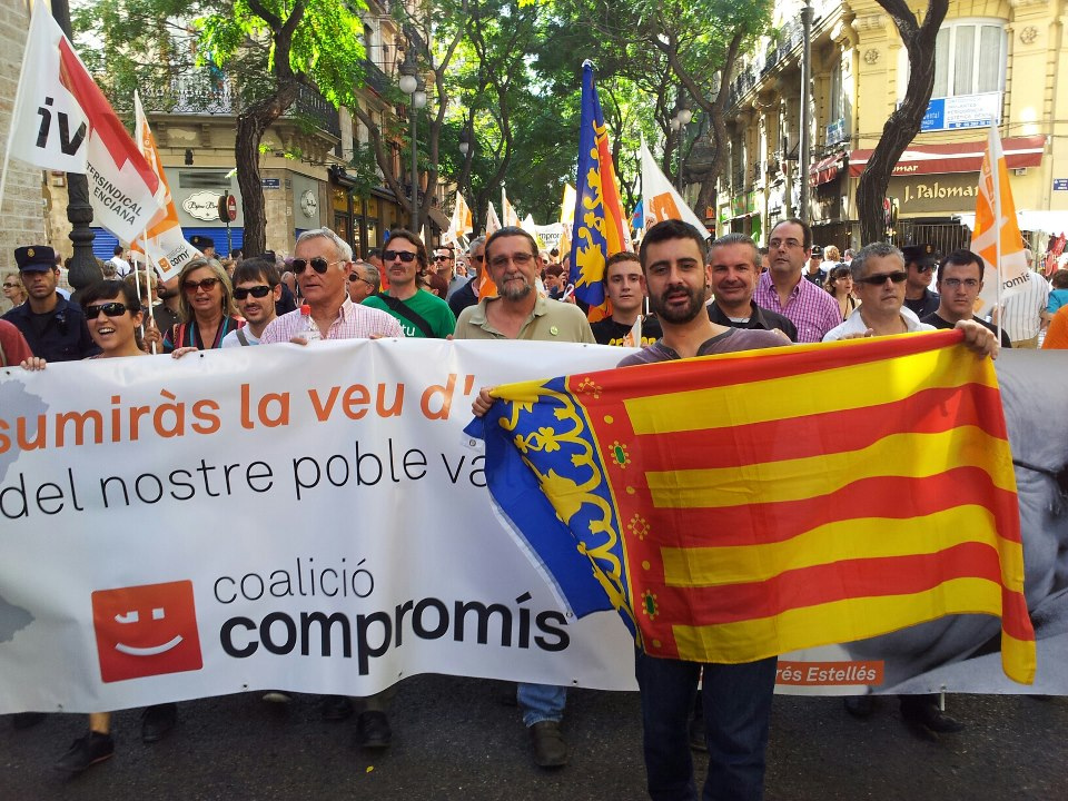 Joan Ribó, Juan Ponce i Pere Fuset a la Processó Cívica